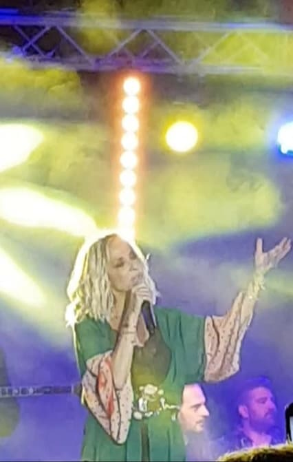 Η Βίσση το 2019